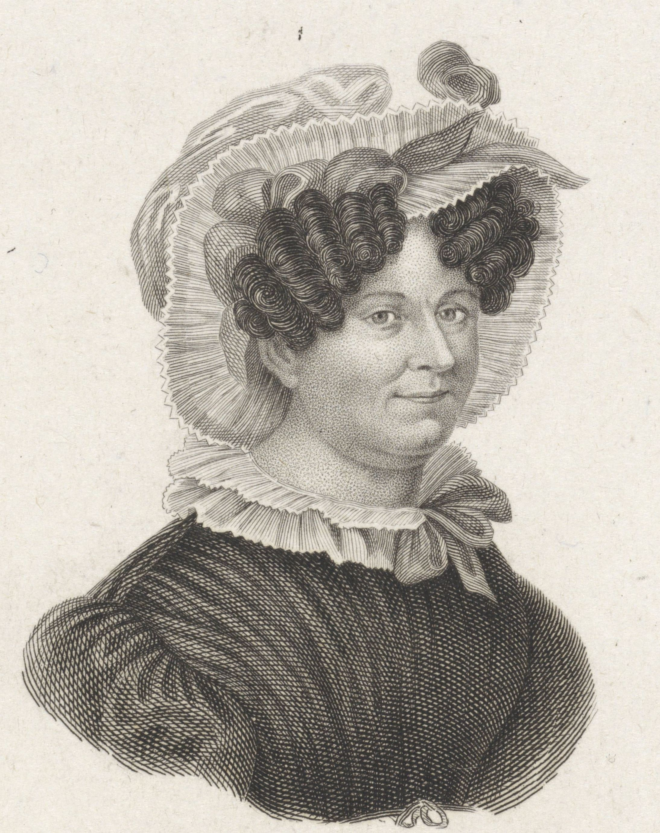 Portret van de schrijfster Anna Barbara van Meerten-Schilperoort